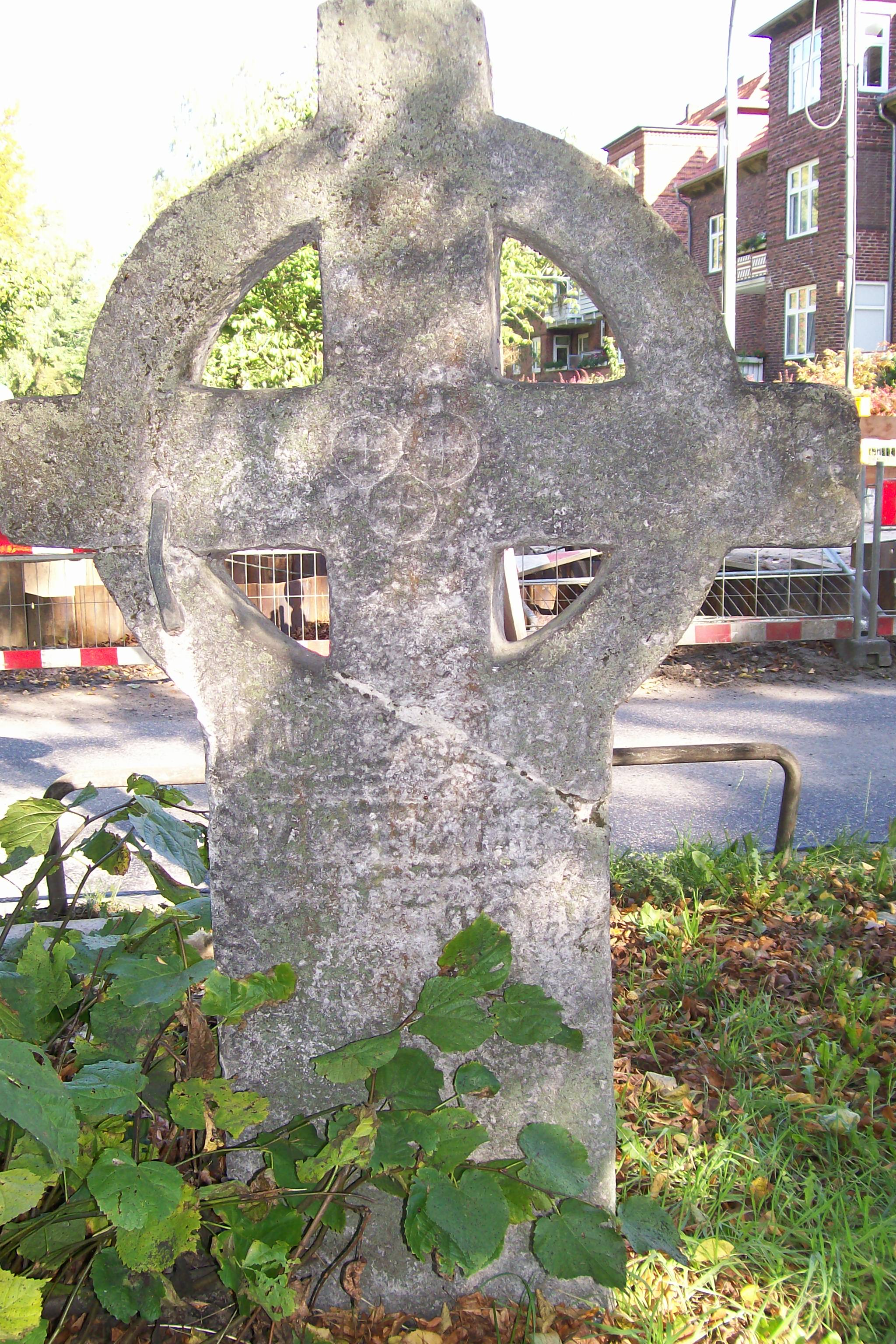 Das Kleverschusskreuz ist ein Wegekreuz von 1436 in Lübeck-St. Gertrud, das Pilgern den Weg aus der Stadt zur Wunderblutkirche in Bad Wilsnack (Brandenburg) wies